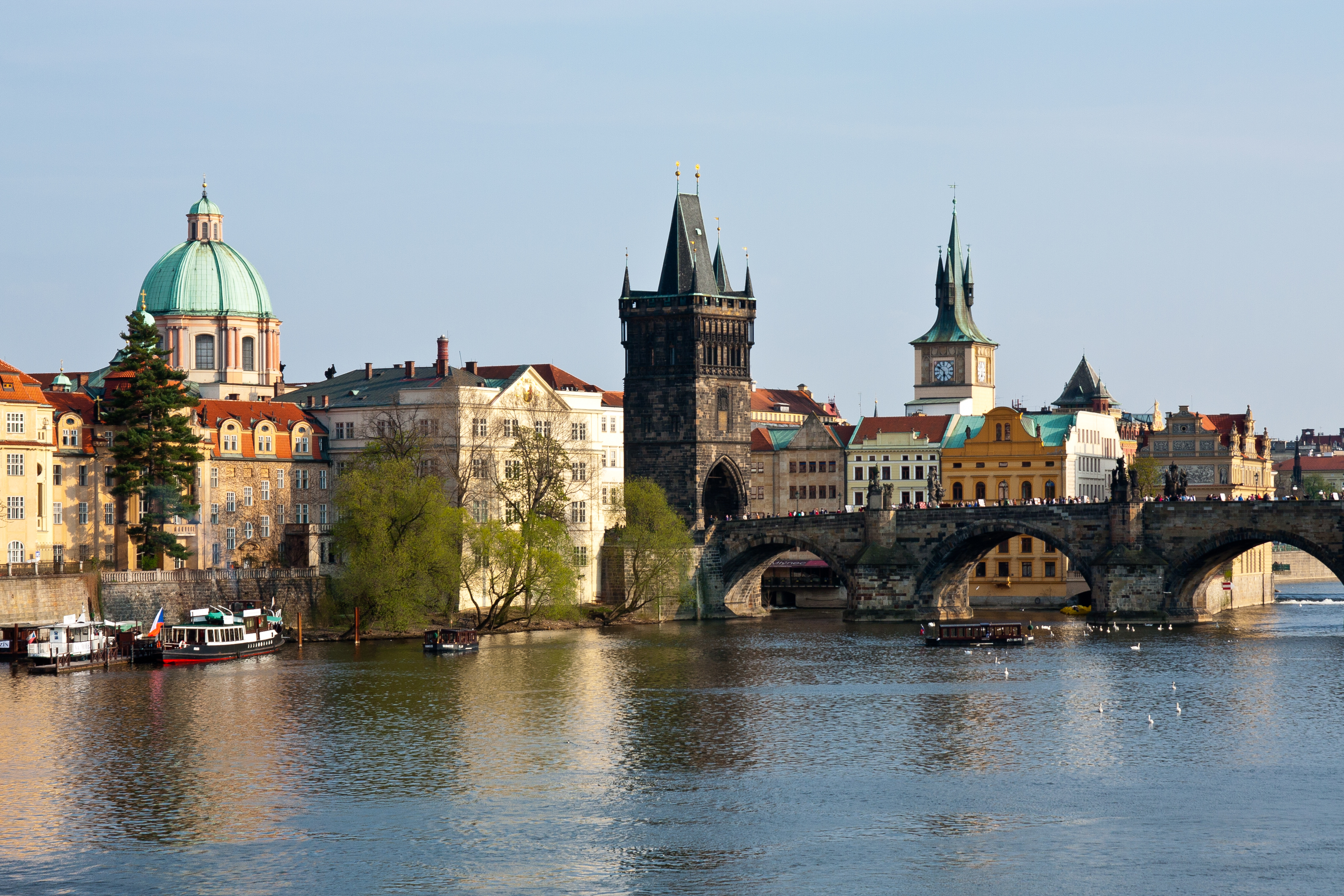 Karlův most, Staré Město a Malá Strana, mezi Křižovnickým náměstím a Mosteckou